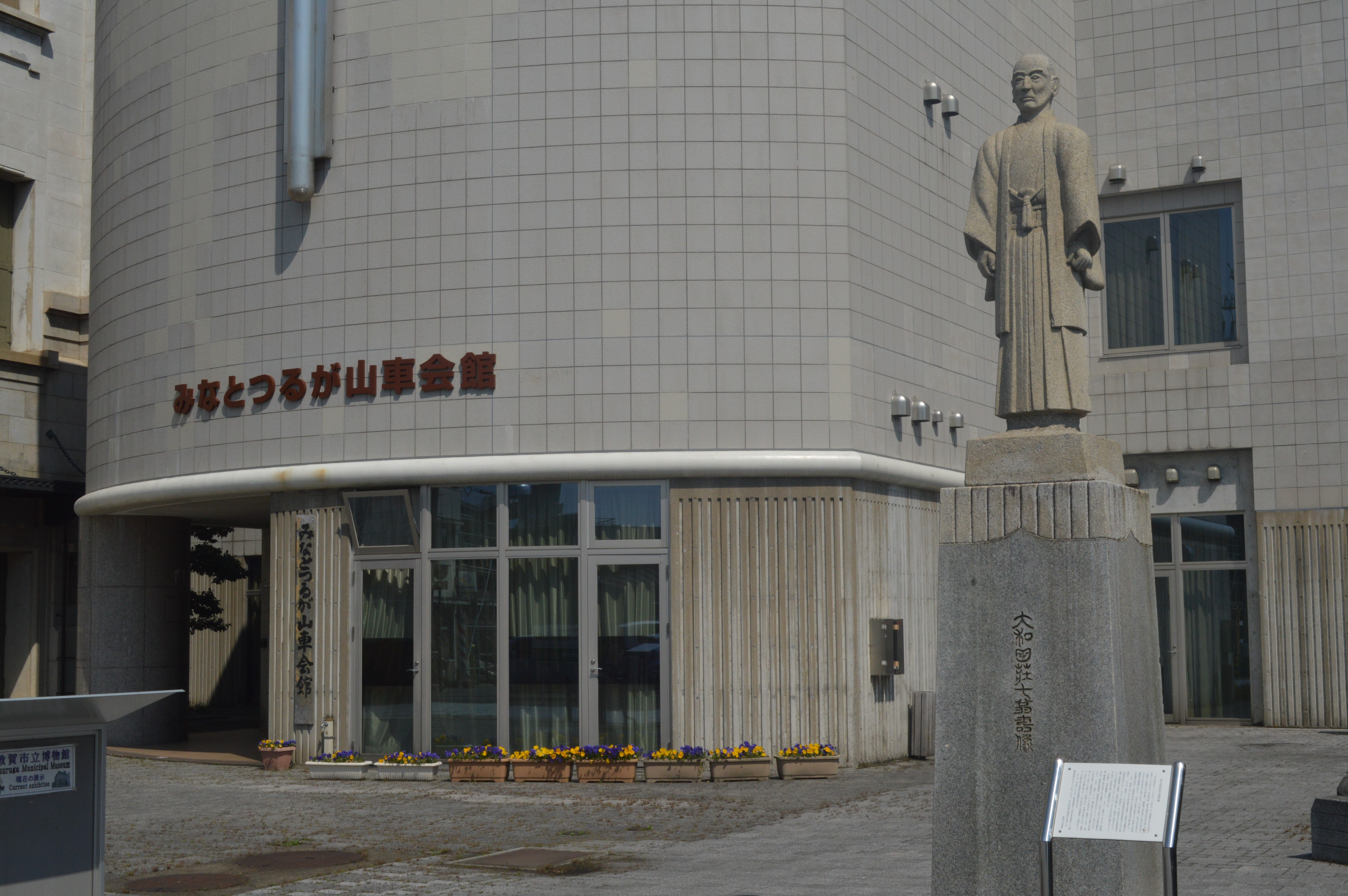 福井県敦賀市相生町7-6にあるみなとつるが山車会館。右は「二代大和田荘七翁寿像」。